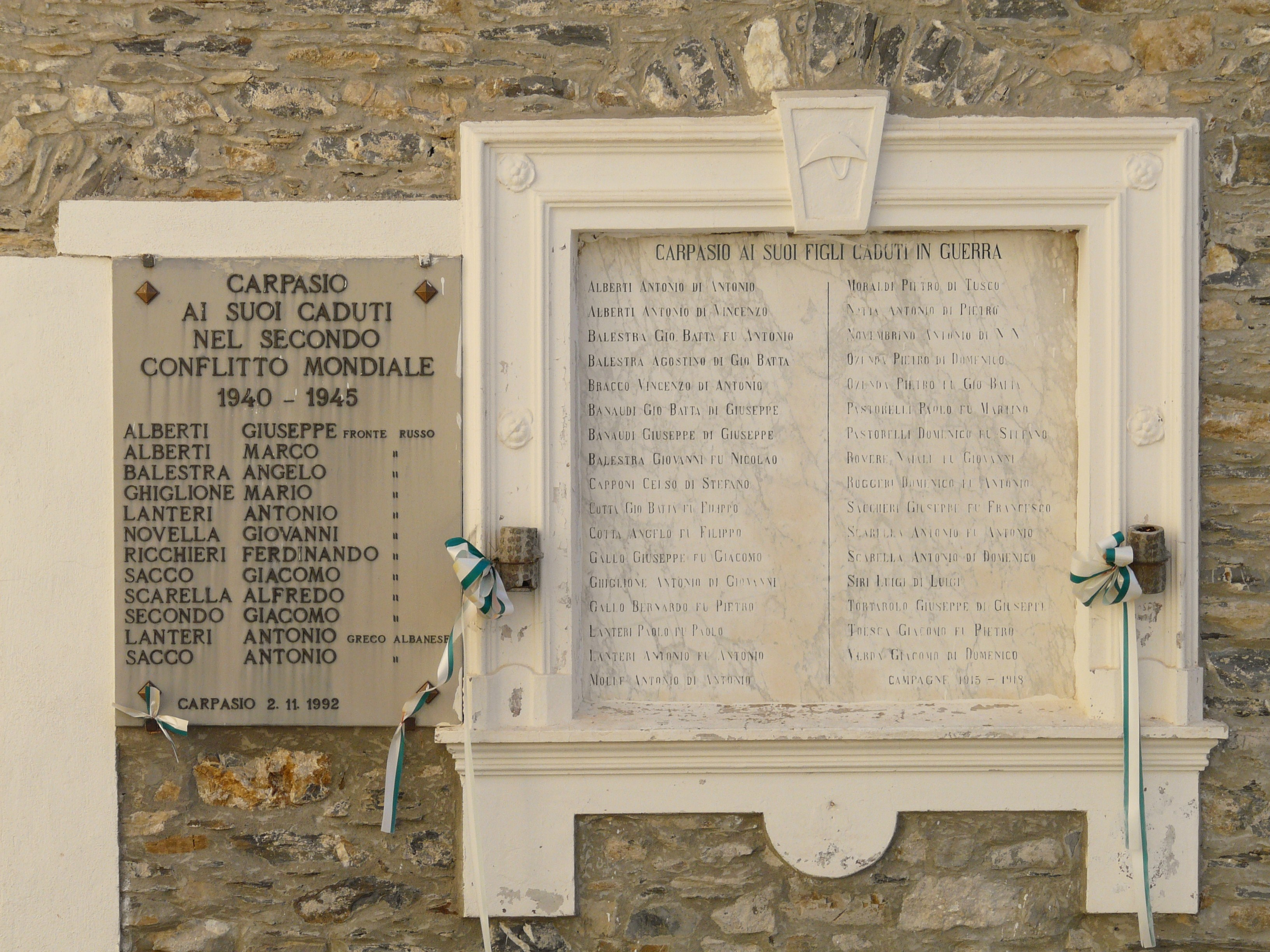 Targa ai caduti, Carpasio, Liguria, Italia